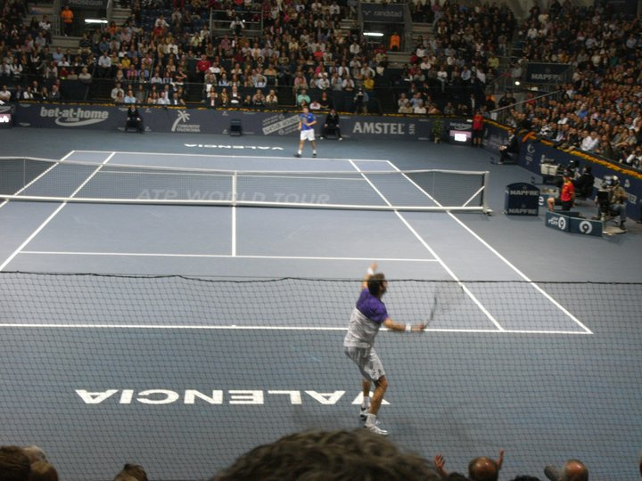 Open 500 de Valencia, celebrado en el Agora de la CAC.